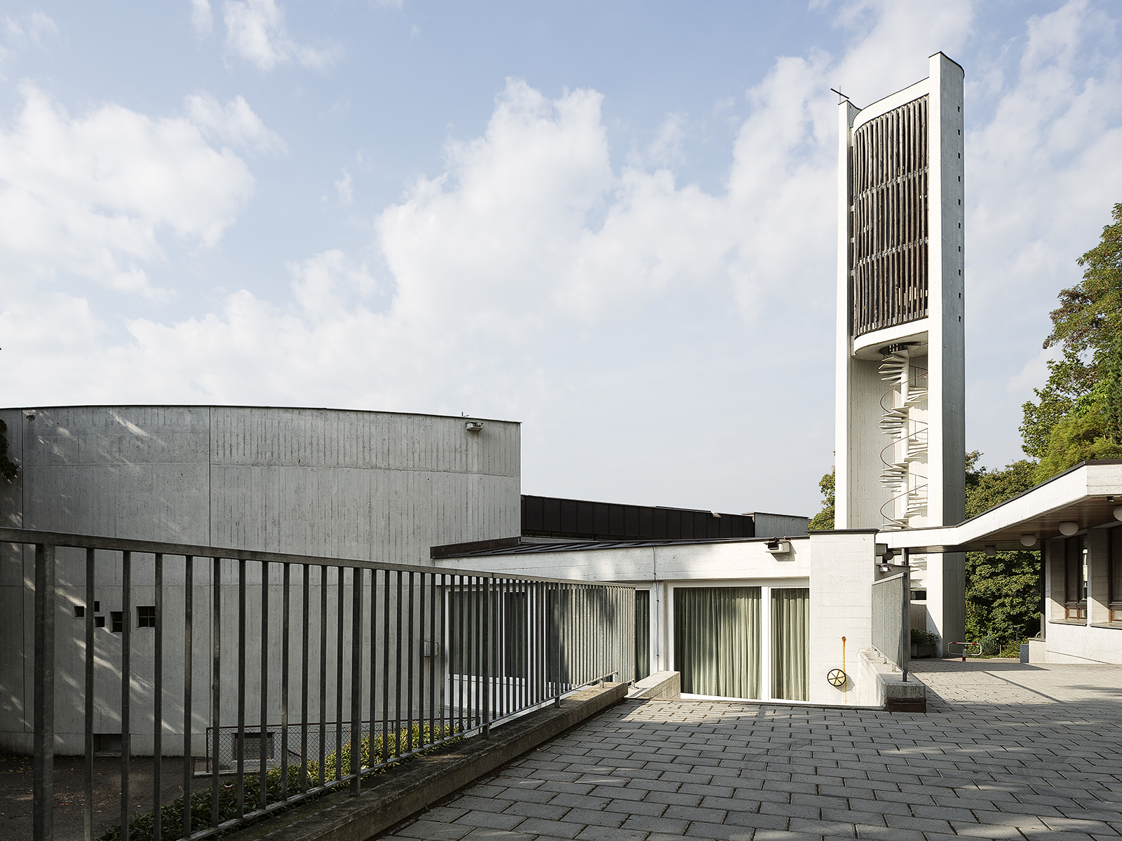 Römisch-katholische Kirche Bruder Klaus, Birsfelden, Basel-Landschaft